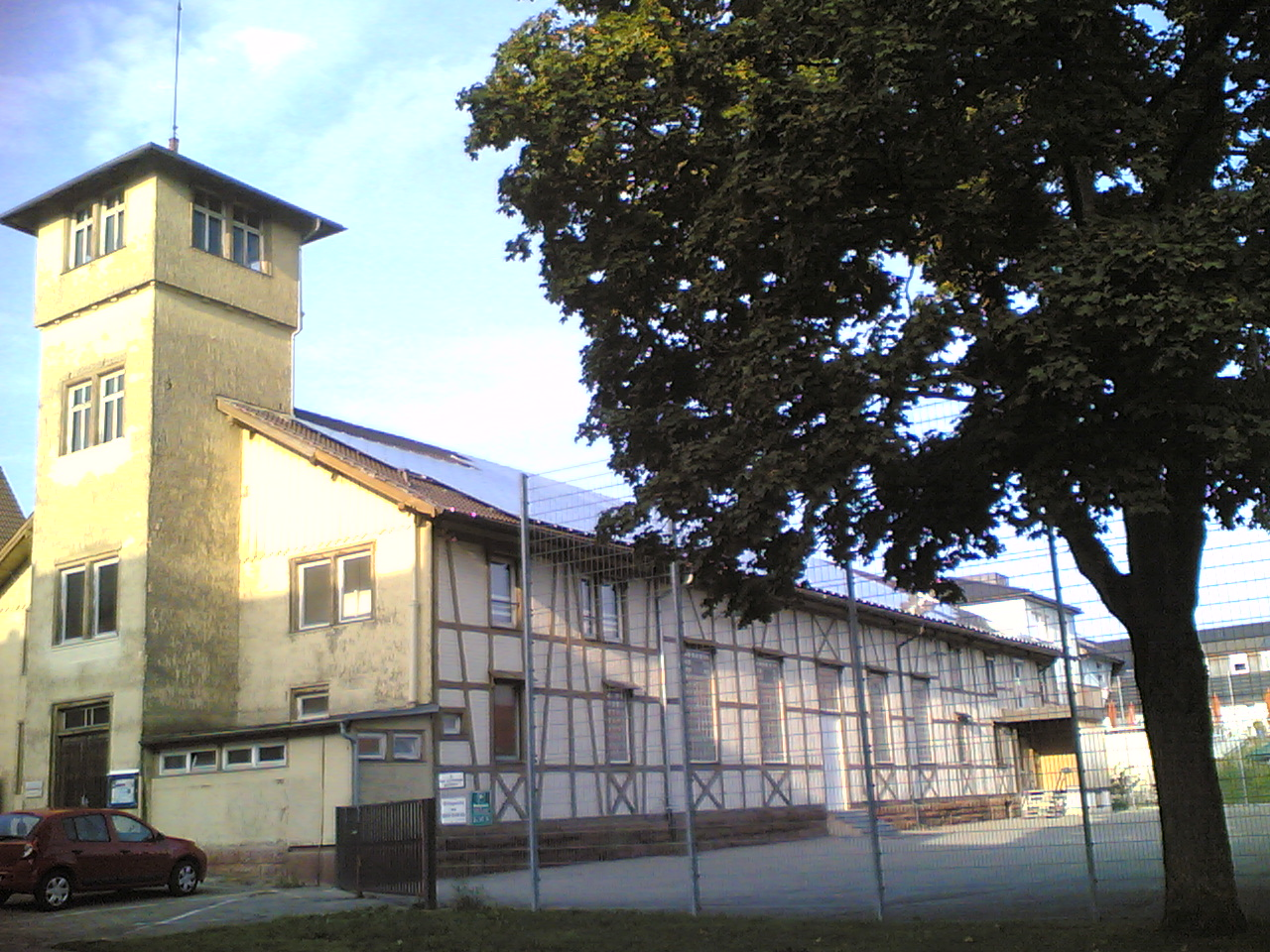 Bürk-Turnhalle, Villingen-Schwenningen, Deutschland